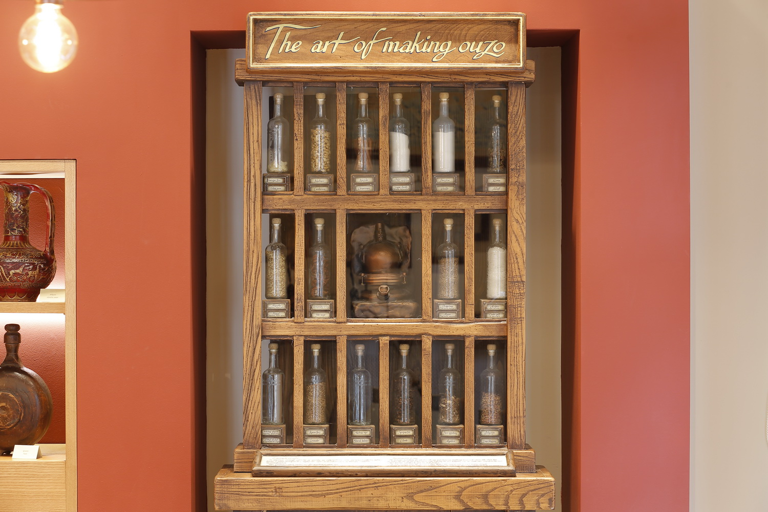 Κάποια από τα υλικά του Ούζου Πλωμαρίου Ισιδώρου Αρβανίτου